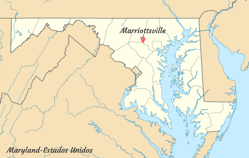 Ubicación de Marriottsville en Maryland